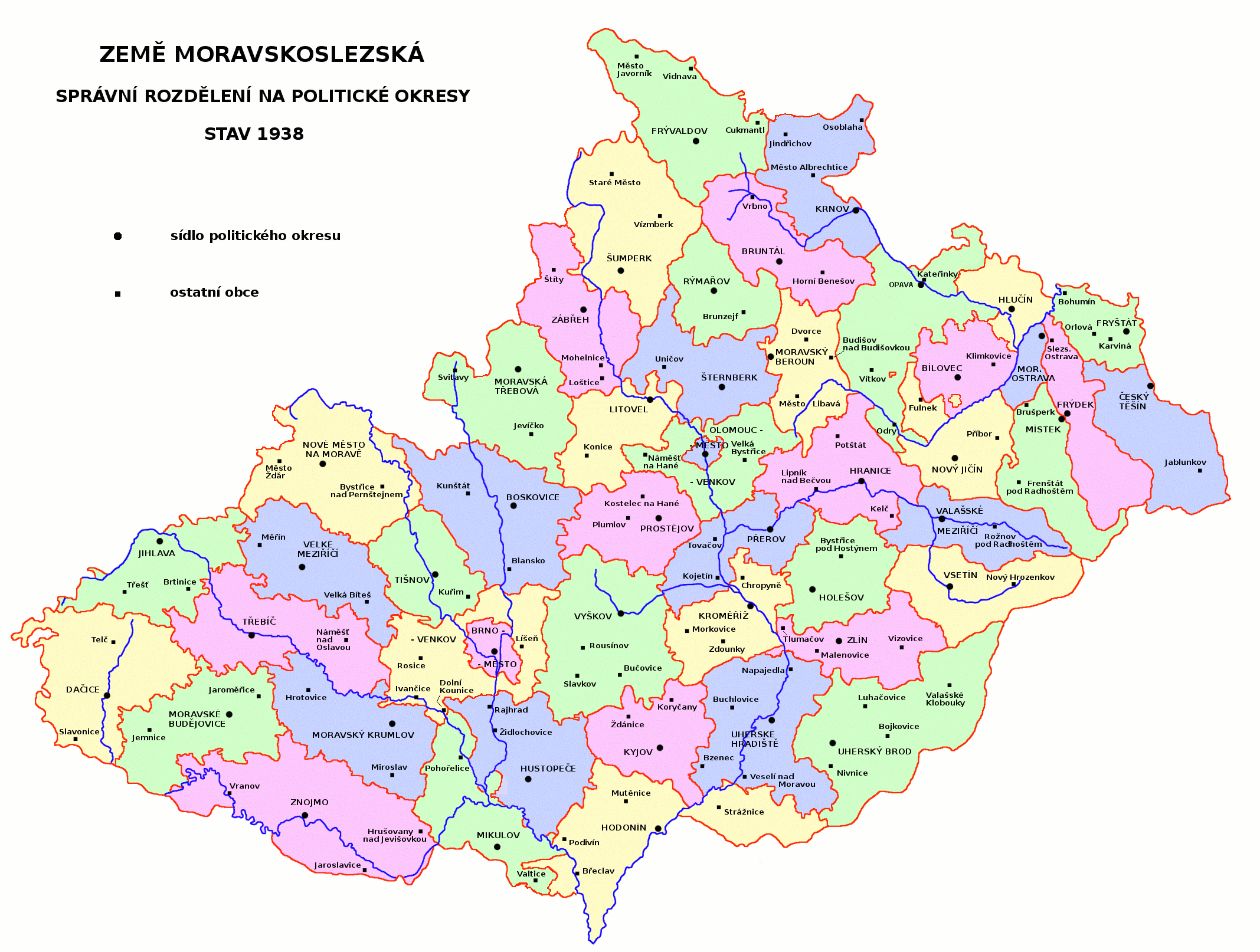 Správní rozdělení Země Moravskoslezské na politické okresy včetně statutárních měst (stav v letech 1928 - 1938)